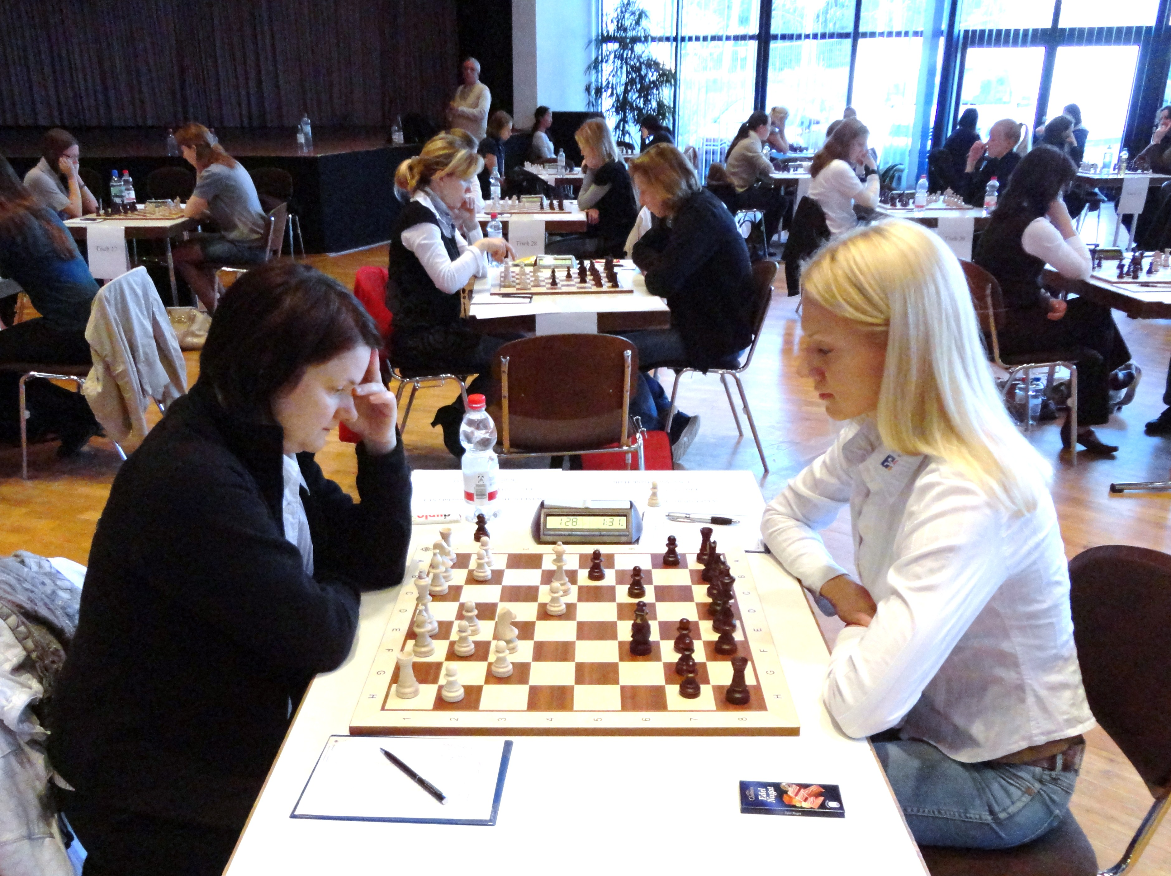 Im Vordergrund: Gundula Heinatz (Karlsruhe) - Anna Sharevich (Halle), Finalrunden der Schachbundesliga der Frauen, Saison 2011/12 in Gladenbach.